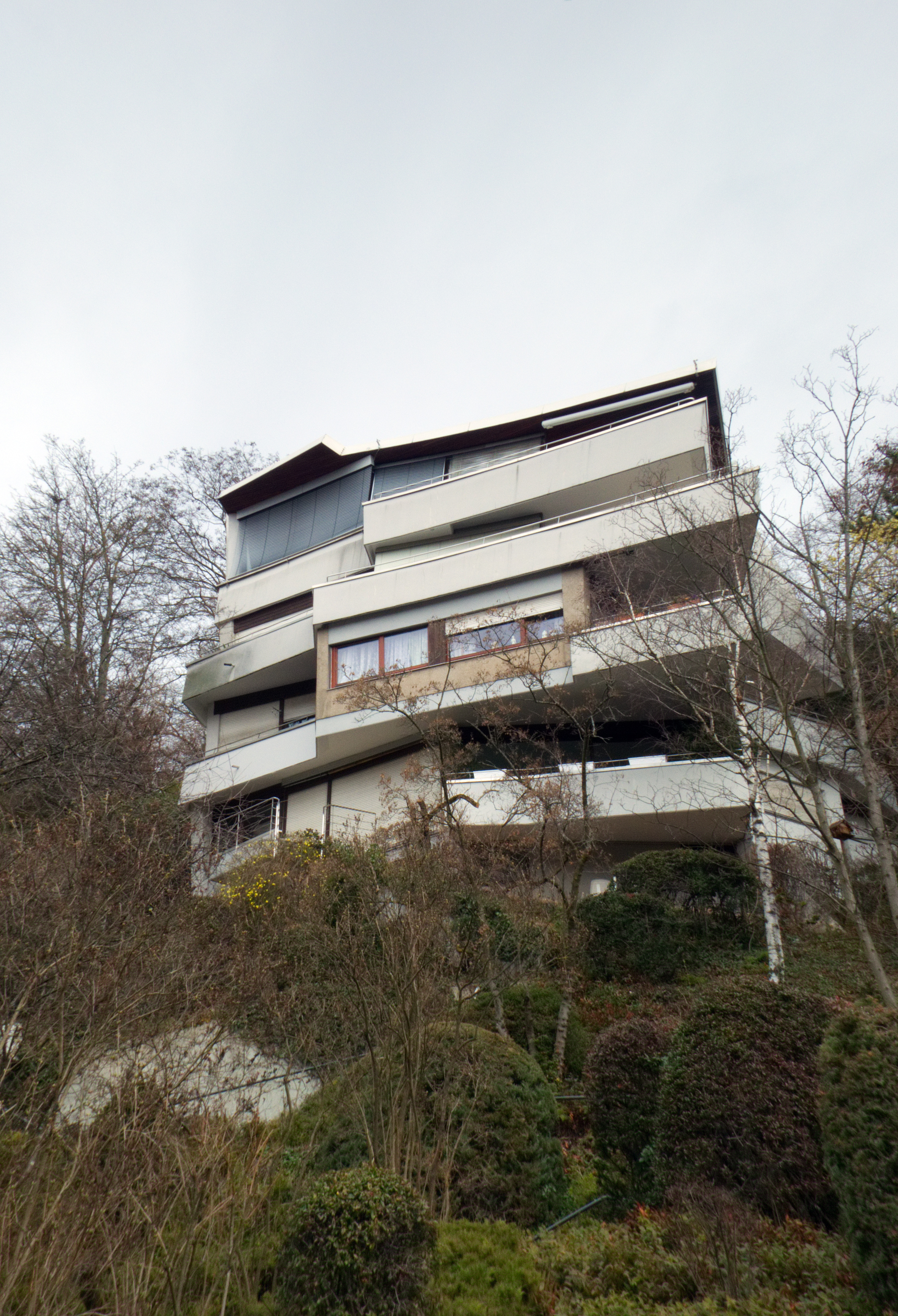 Mehrfamilienhaus Eduard-Pfeiffer-Str. 29, Stuttgart. Erbaut 1960 von Chen Kuen Lee im Internationalen Stil. Geschützt nach § 2 DSchG.